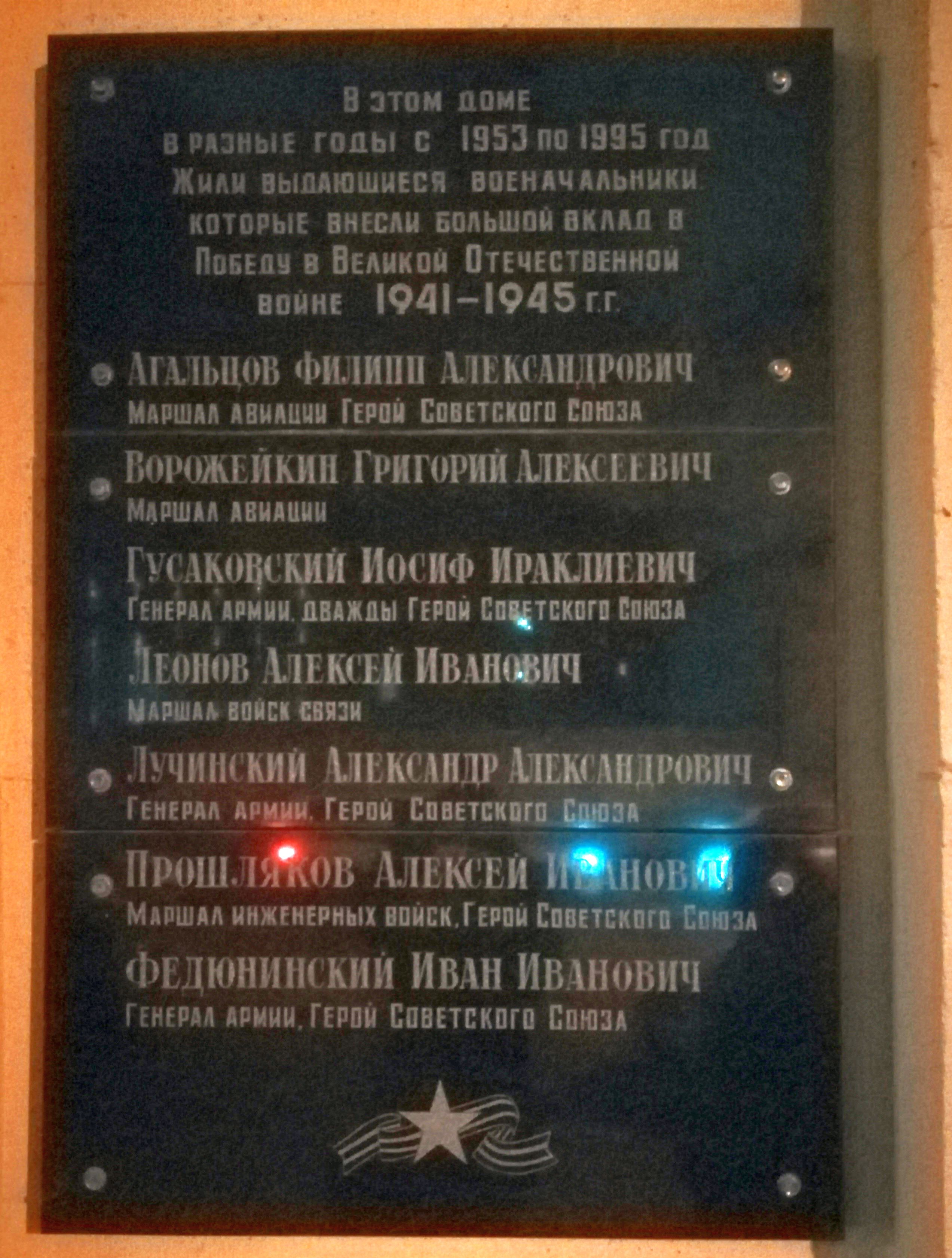 Мемориальная доска